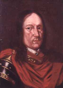 Der schwedische Adelige und finnische Generalgoverneur Herman Fleming / Herman Klaunpoika Fleming (1619-1673)